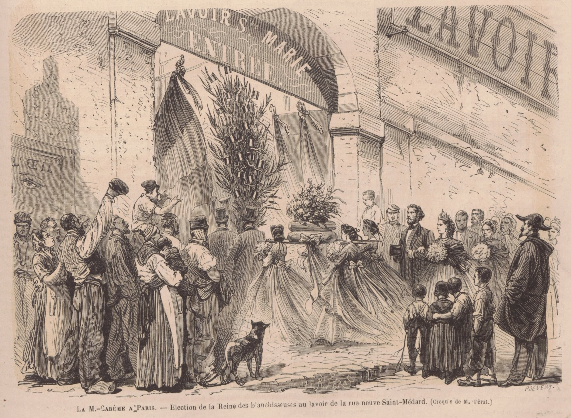 Election de la Reine des Blanchisseuses au lavoir de la rue neuve Saint-Médard à Paris en mars 1866.